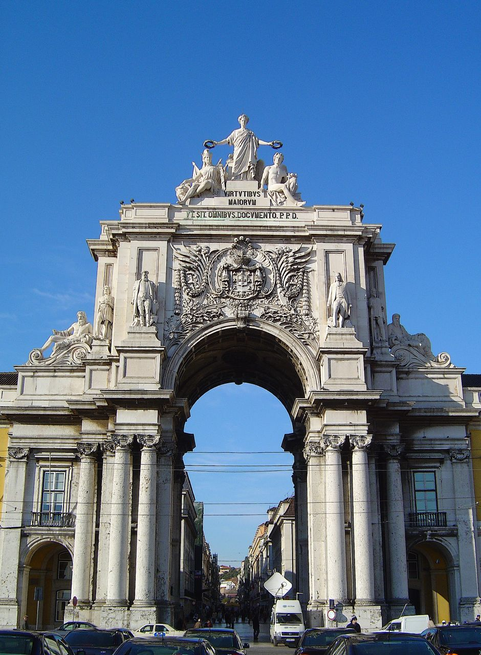 Arco da Rua Augusta - Lisboa - Portugal